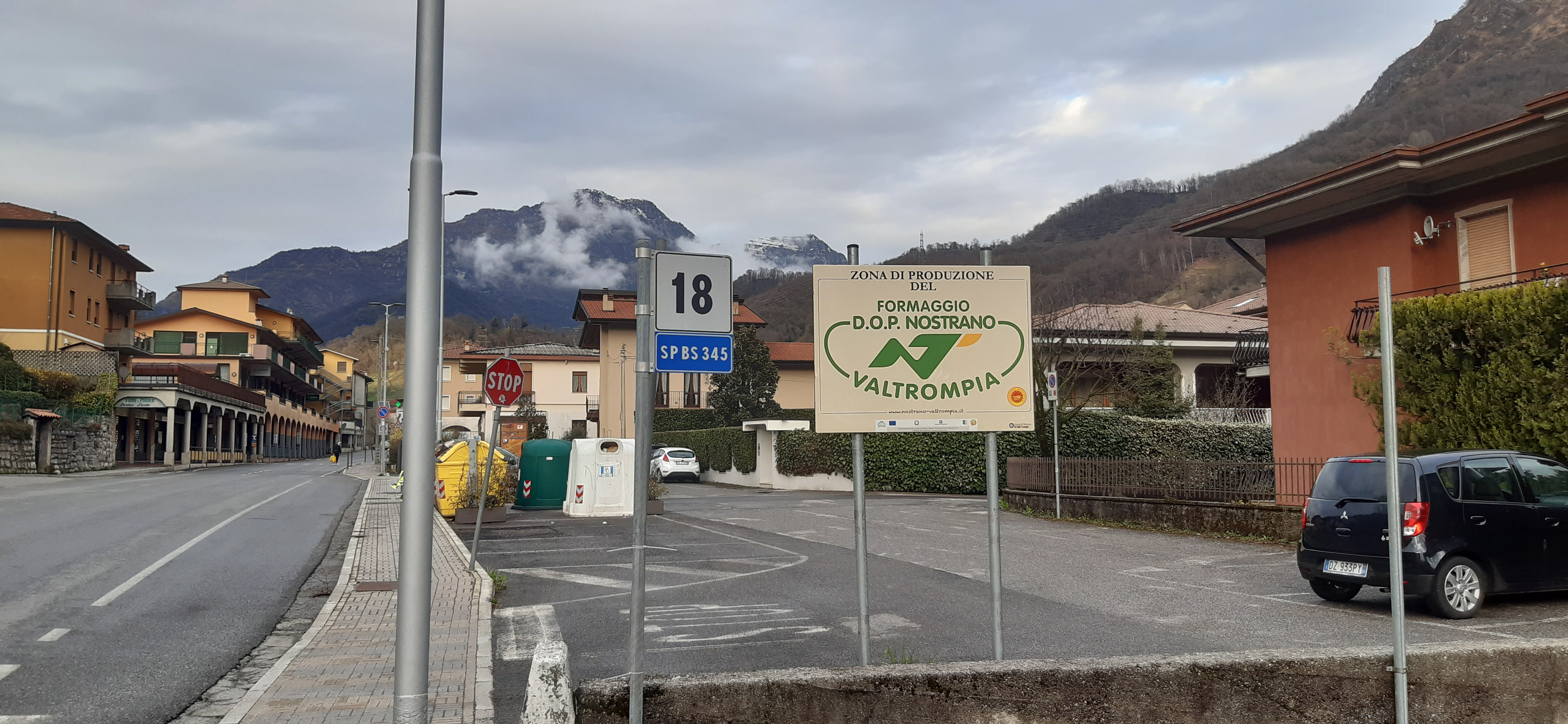 Marcheno (Brescia). Provinciale SP 345. Cartello territorio consorzio Nostrano Val Trompia DOP